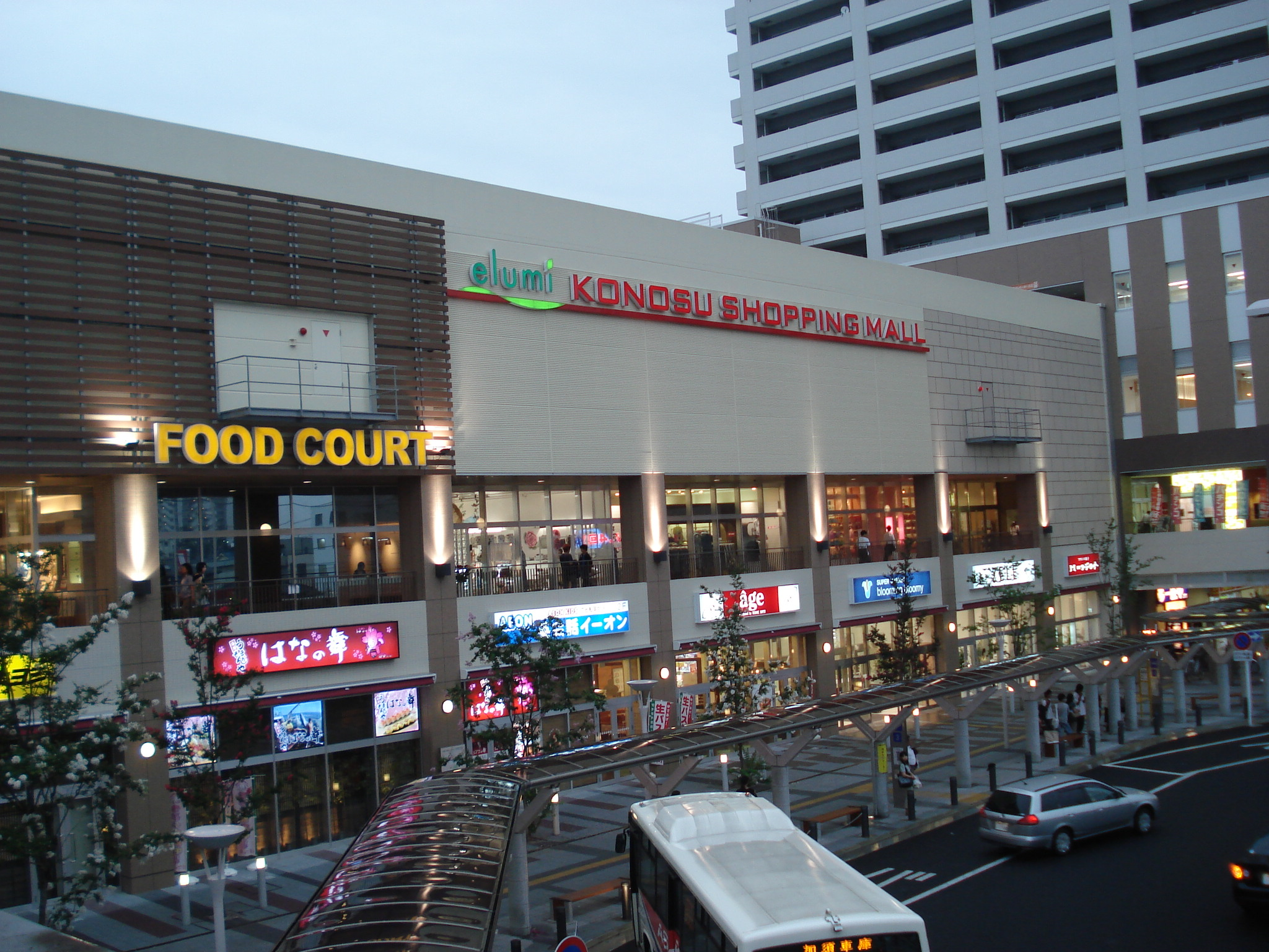 エルミこうのすショッピングモール 外観